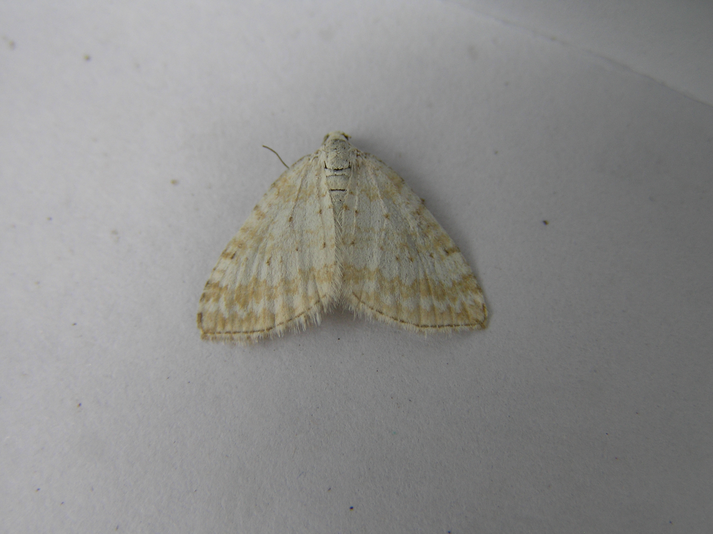 Perizoma albulata (Zwaakse Weel, the Netherlands)